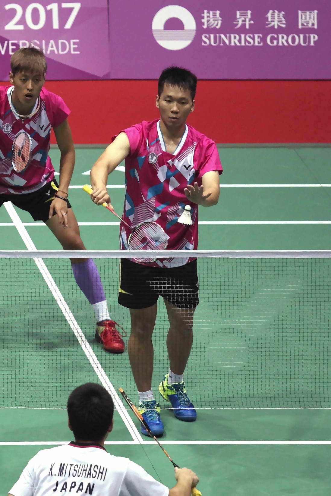 2017 臺北世大運個人男雙 李洋 01